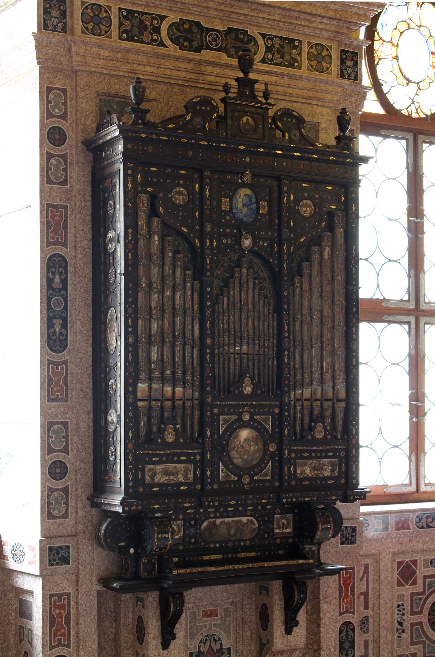 Prunkorgel in der Reichen Kapelle der Münchner Residenz (Johann Schenauer, Augsburg um 1590)